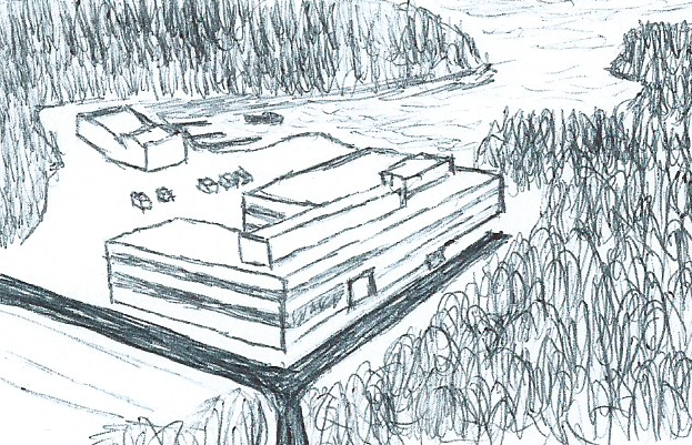 Draken, Haakonsvern